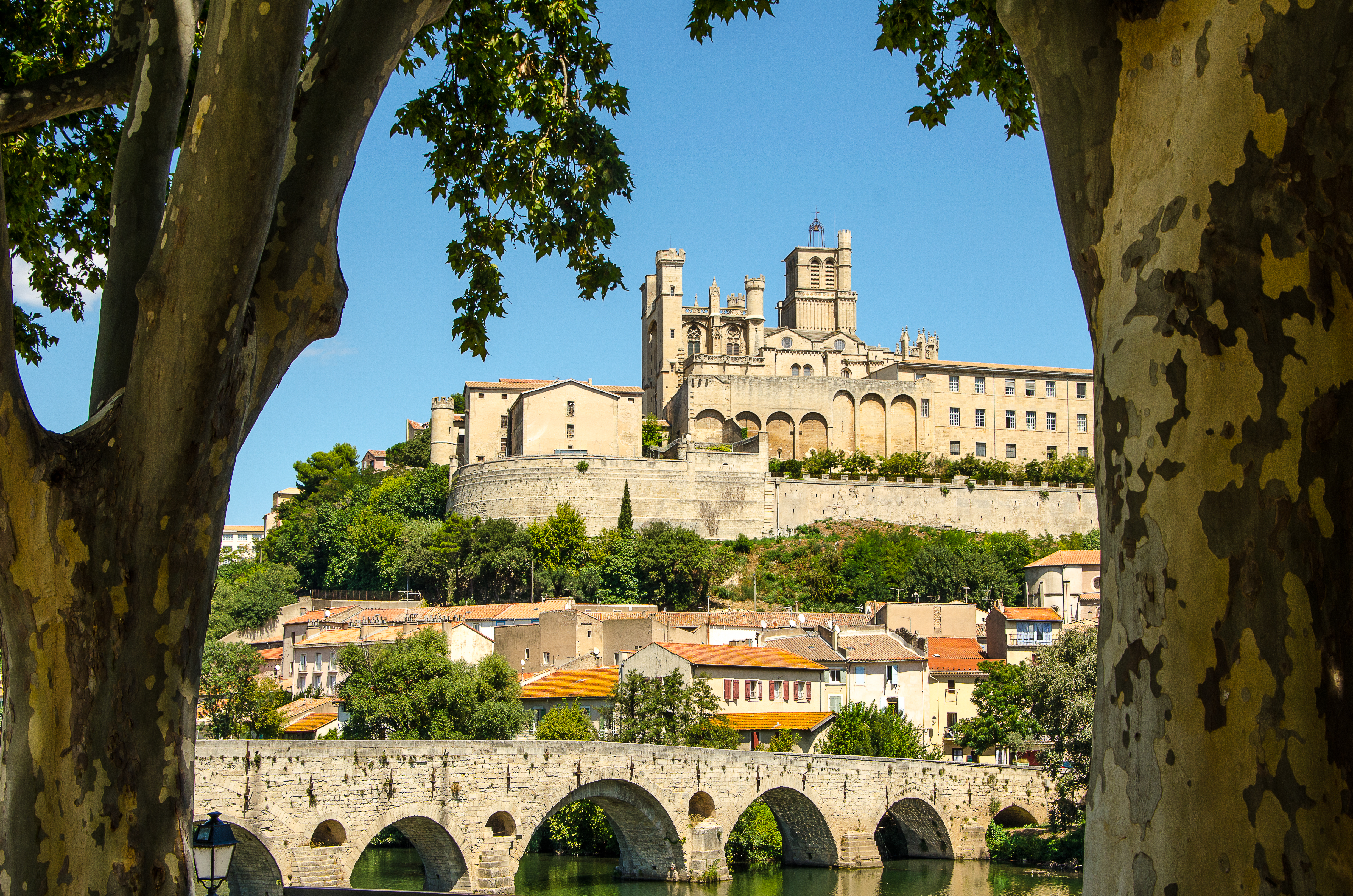 Beziers